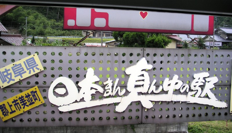 長良川鉄道・八坂駅の看板